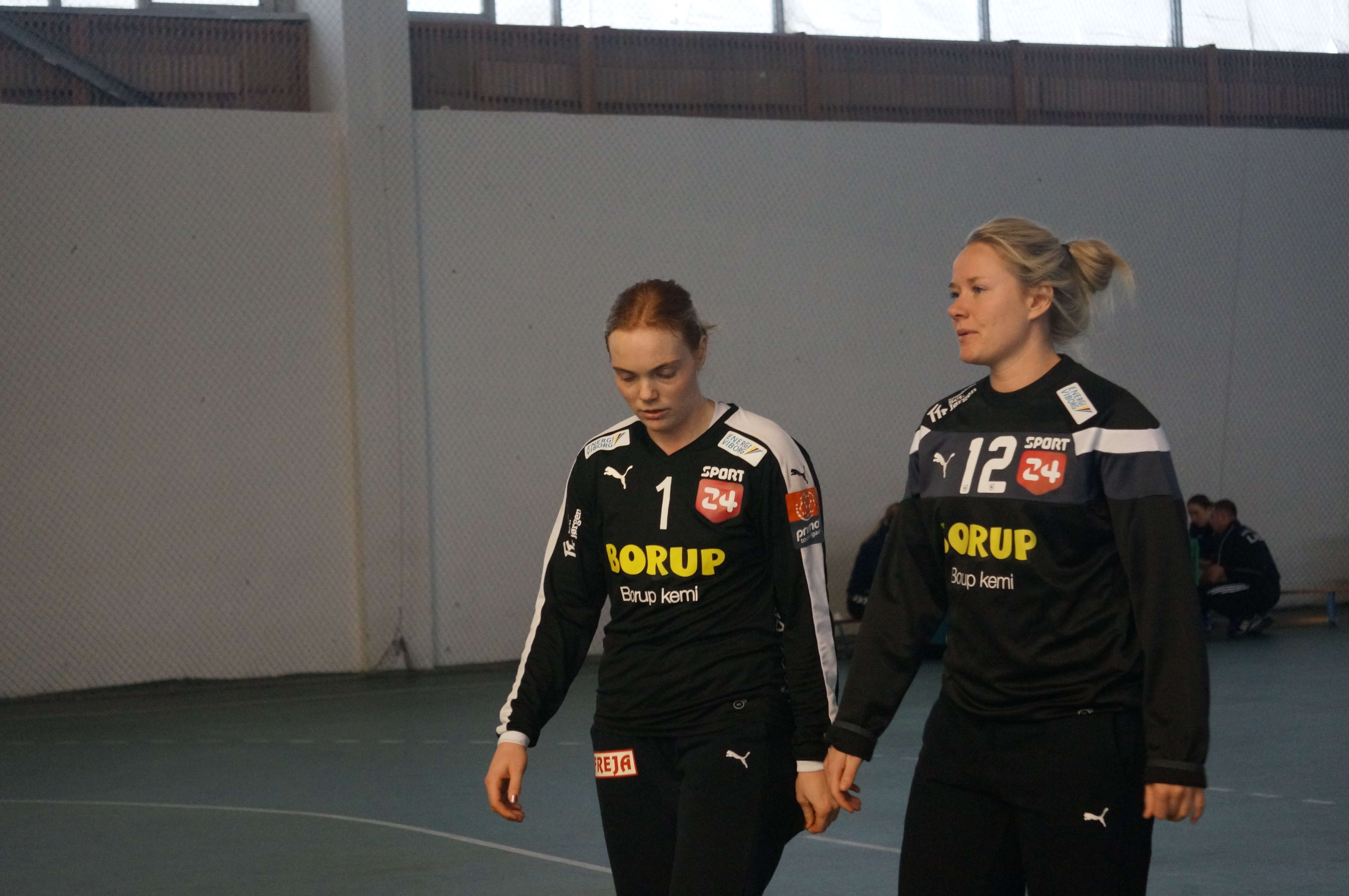 Матч Кубка ЕГФ "Лада" (Тольятти) - "Виборг" (Виборг). Тольятти, Россия, 13 ноября 2016. Игроки ГК "Виборг": Рикки Паульсен (12) и Миэ Сёренсен (1)